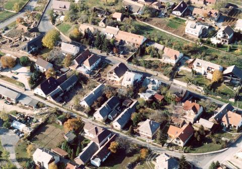 Panoramo de Alsóörs.